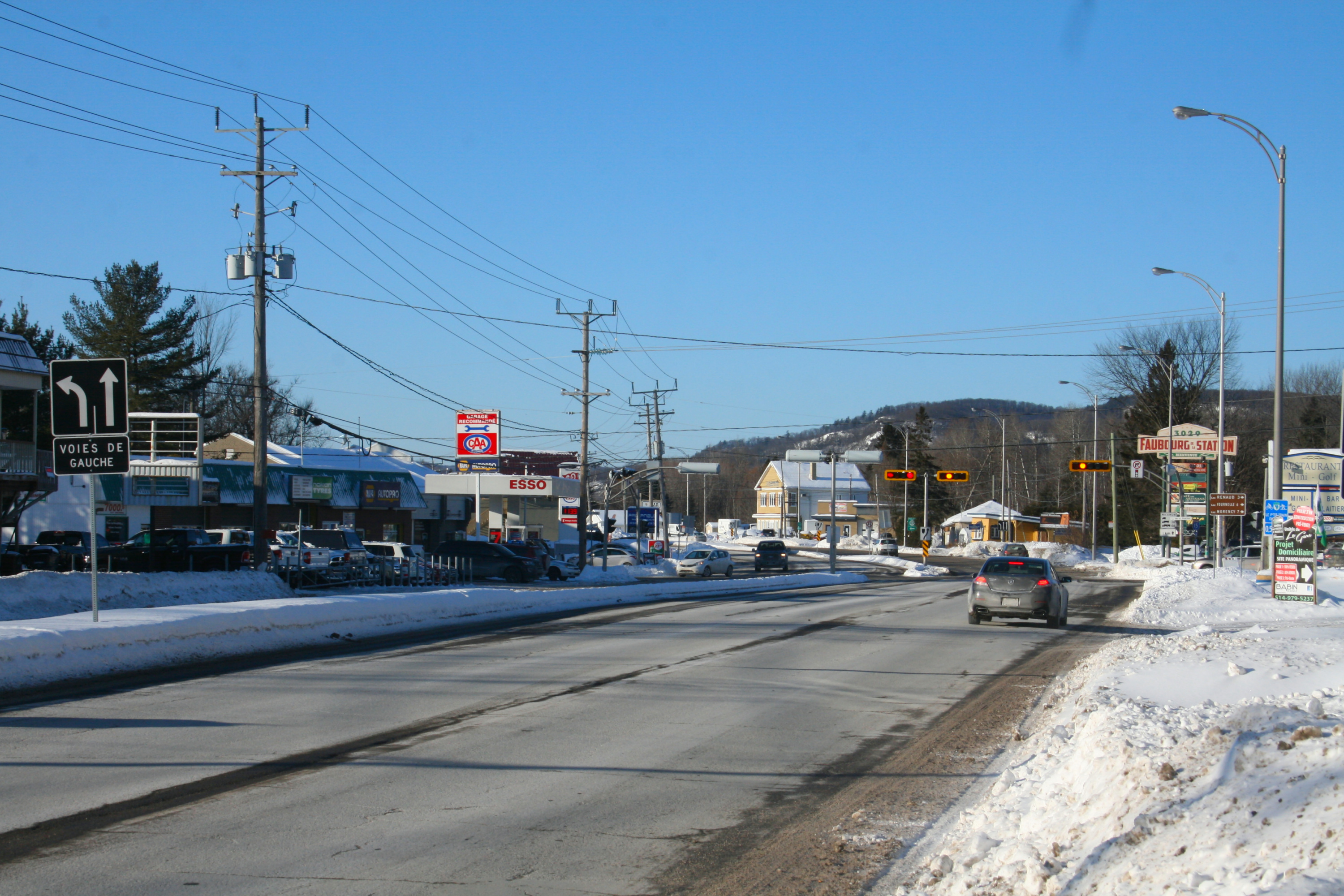 Prévost, Quebec, Canada